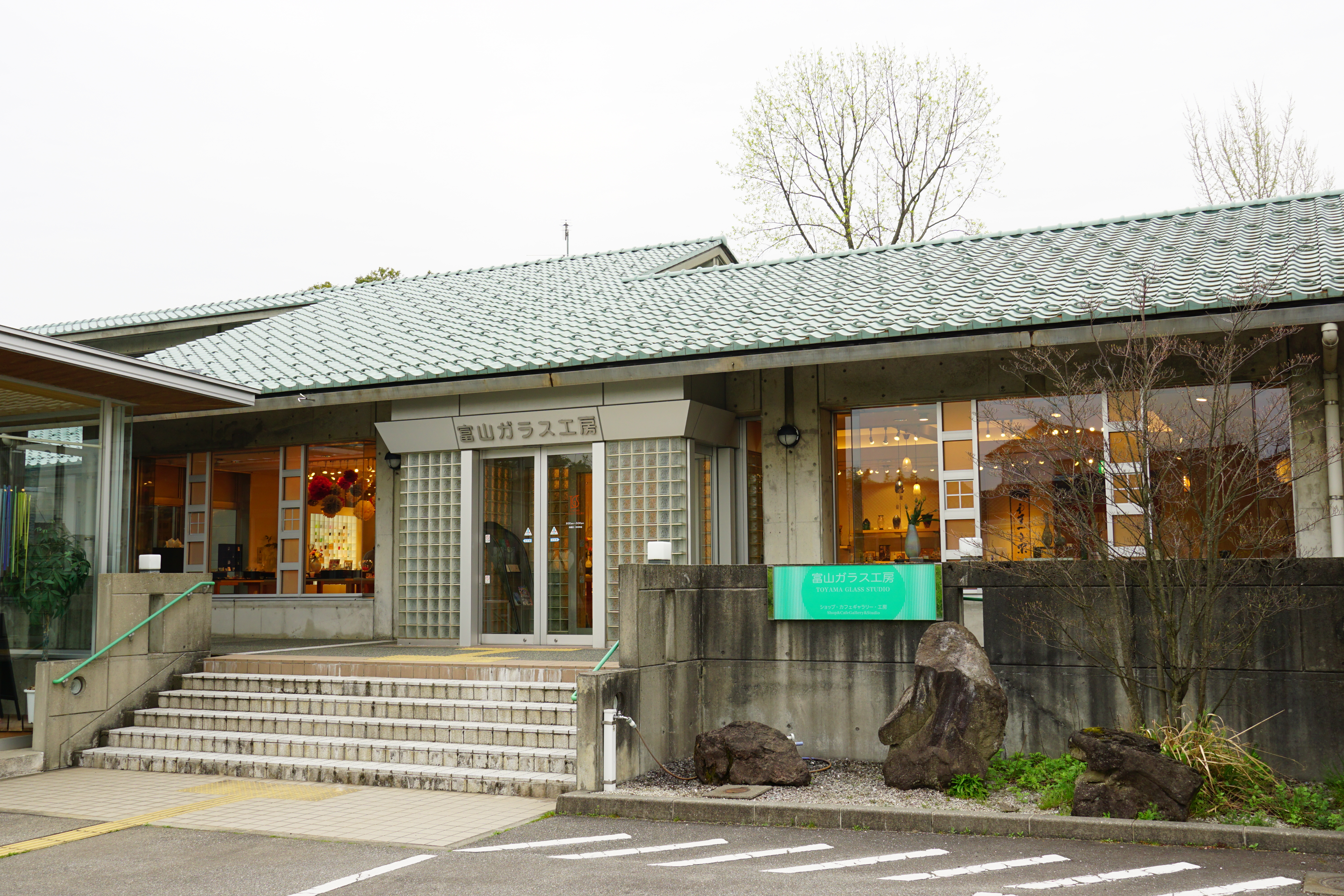 富山ガラス工房の工房ショップがある正面入り口